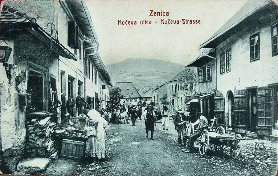 ЗЕНИЦА - ЧАРШИЈА КОЈЕ ВИШЕ НЕМА, 1909. Г. На разгледници из 1909. године у предњем плану је дио чаршије који је ишчезао до краја 1968, ради градње цесте, која води према дрвеном мосту (садашњи главни градски трг). Само двије куће од свих још постоје. Камени мост је тада имао дрвену ограду, јер су га Аустријанци проширили ради колског саобраћаја, а камену ограду уклонили. Улица се звала Кочева, а полазила је од Царине и водила до тадашњег трга Мејташ (гдје је сада Аустријска/Коњска чесма).